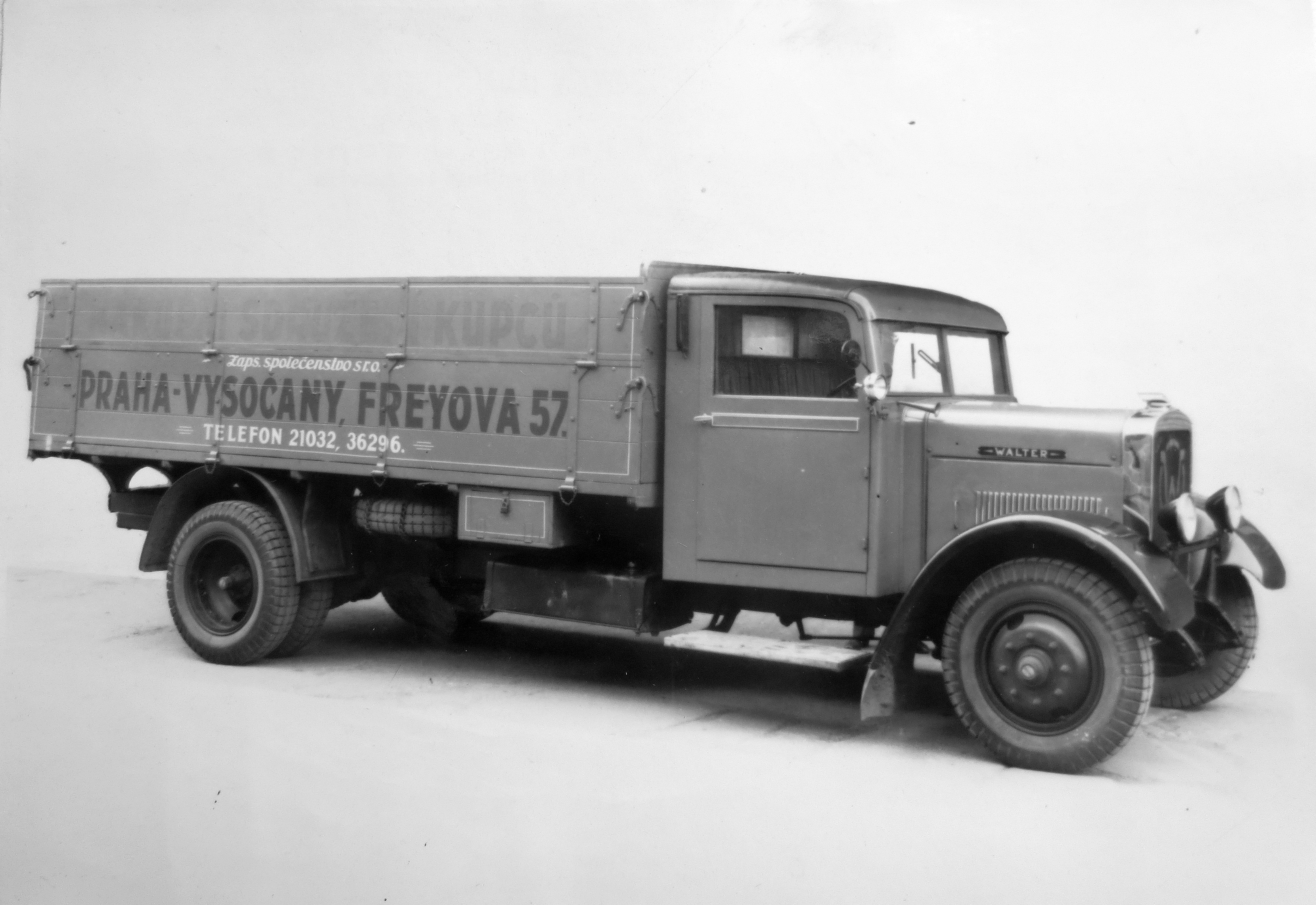 Walter Ideal, valník